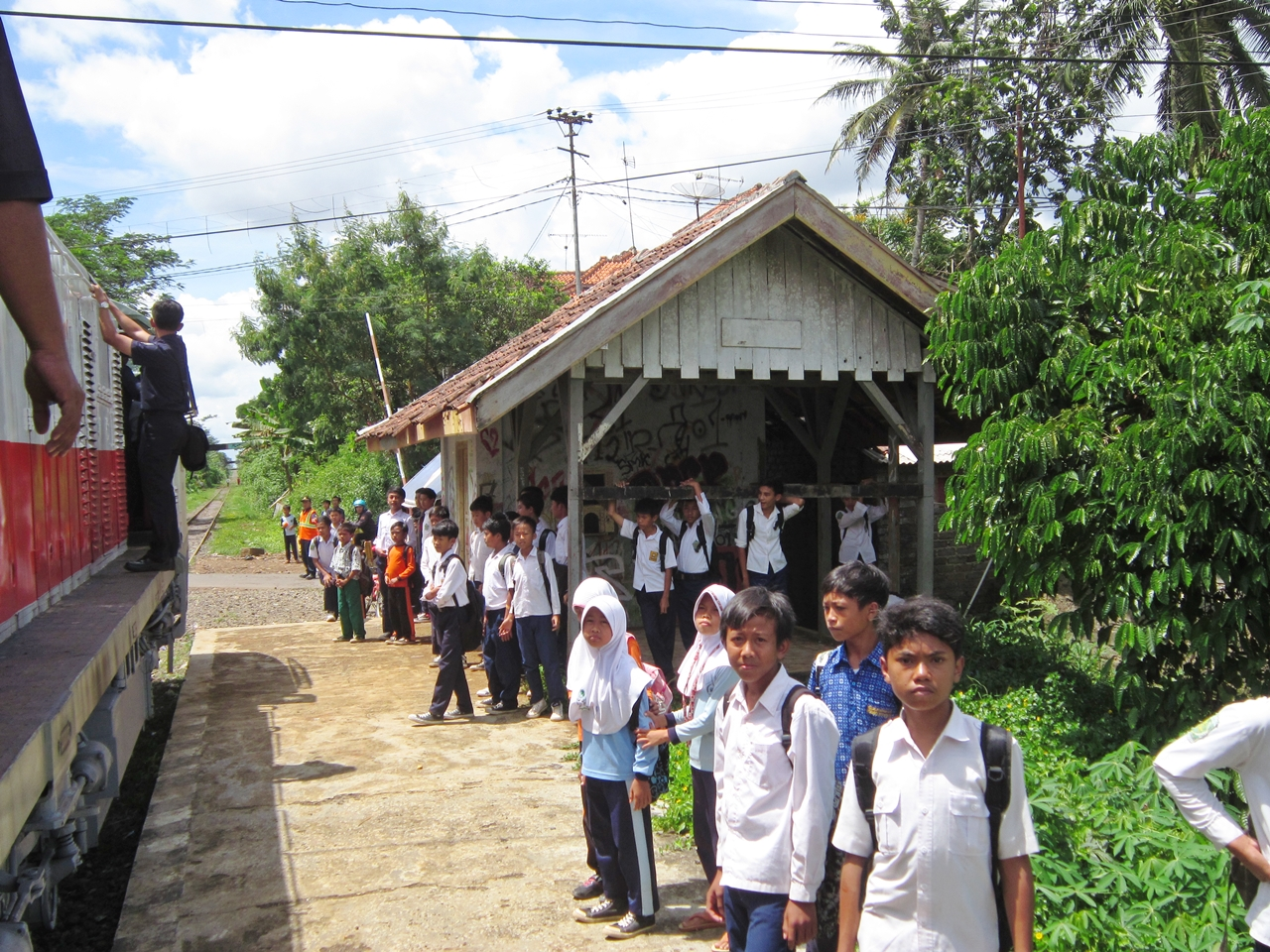 Eks Halte Ranji yang kini sudah tidak aktif.